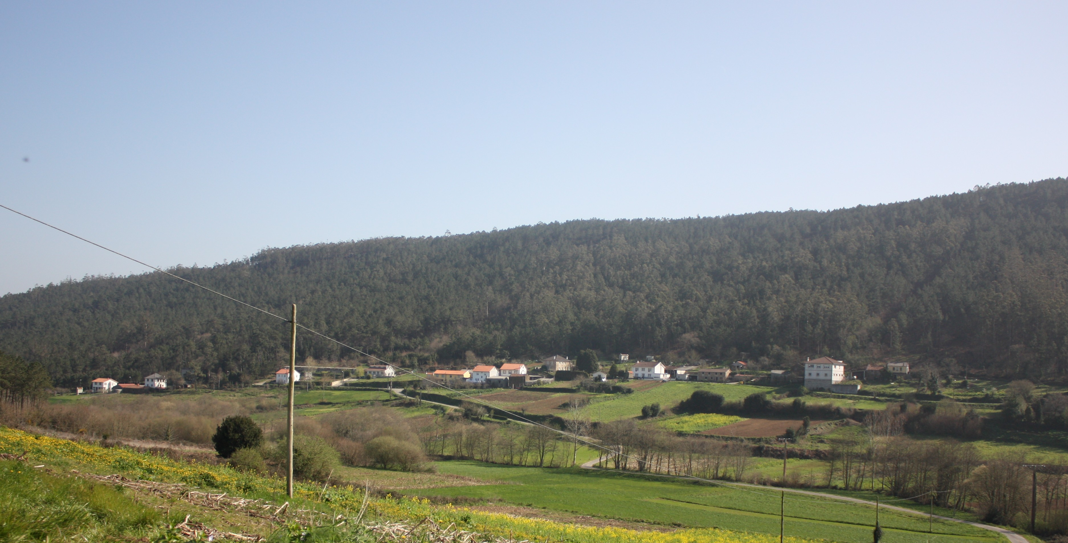 Lugar de Cabana en Cesullas, Cabana, Cesullas, Cabana de Bergantiños (Cabana de Bergantiños